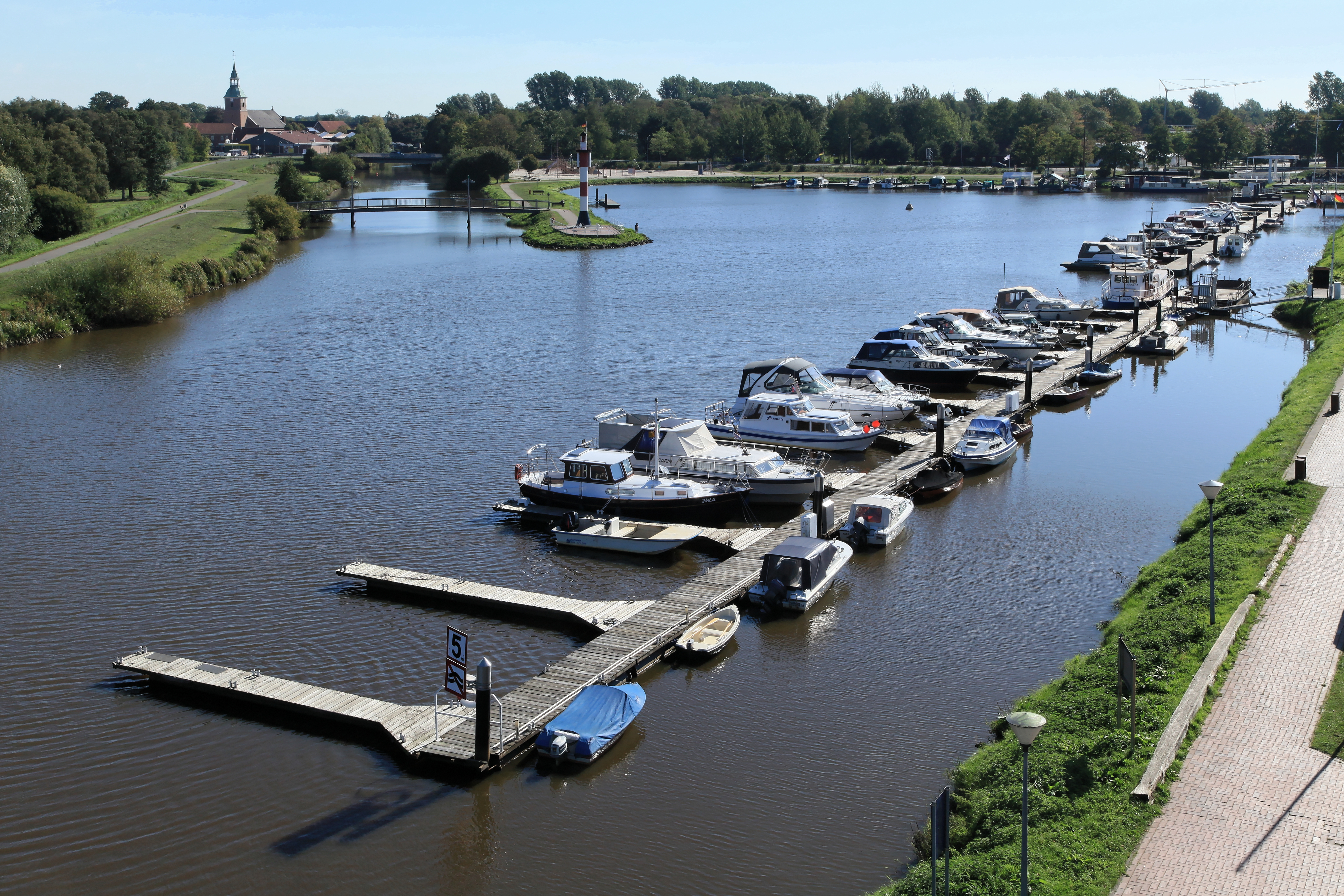 Blick vom Aussichtsturm auf den Bootshafen in Barßel